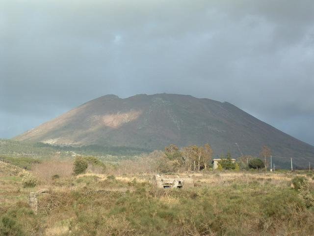 Vésuve